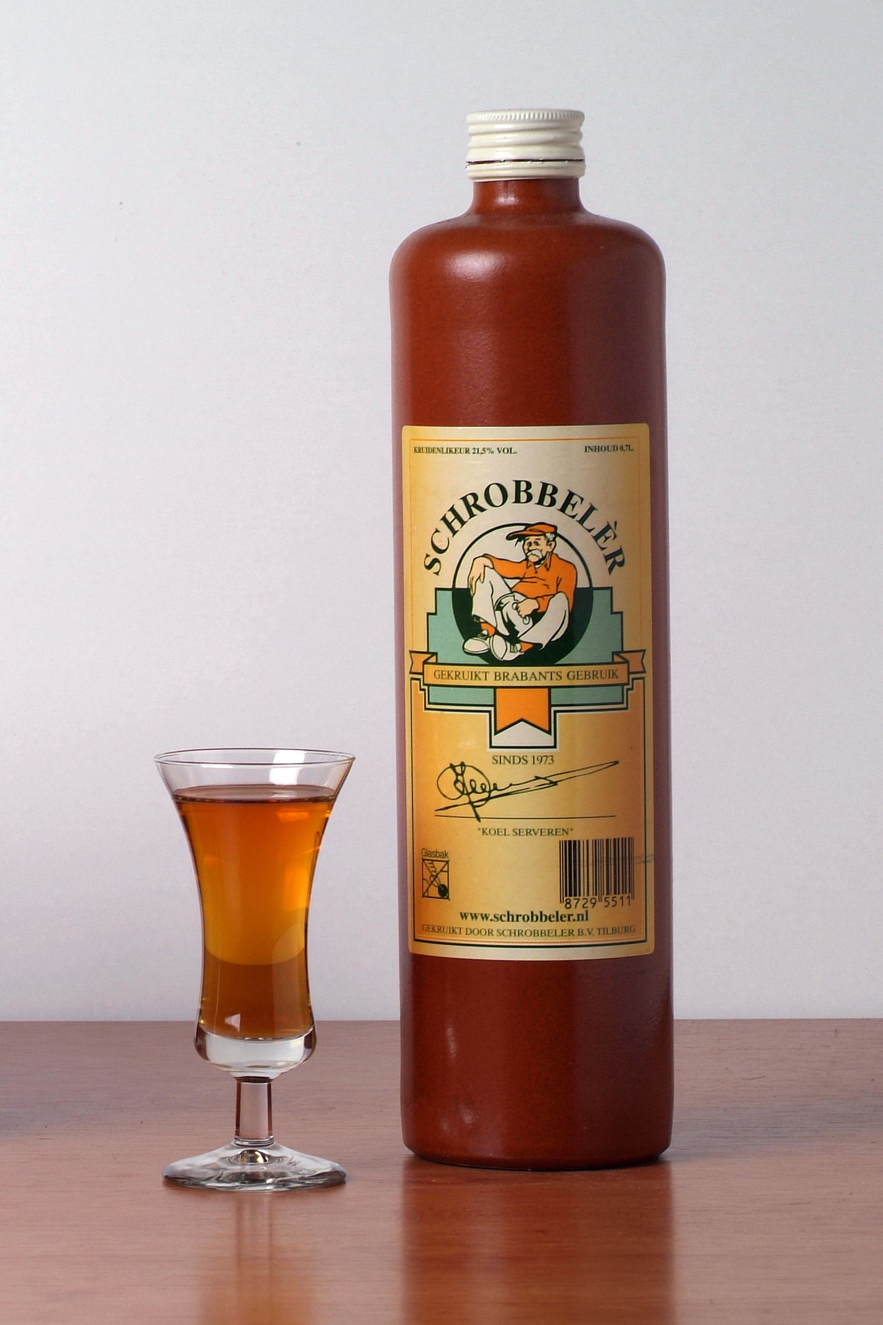 Schrobbeler-kruik met gevuld kelkglaasje. Schrobbelèr is een kruidenbitter / kruidenlikeur uit Tilburg, Noord-Brabant.